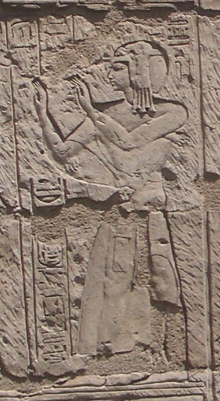 Relief représentant le grand prêtre de Ptah Sheshonq, fils d'Osorkon II - XXIIe dynastie égyptienne - Jardin du Musée du Caire